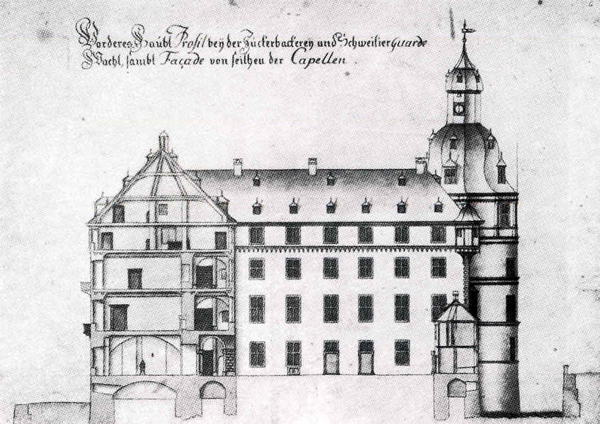 Das Düsseldorfer Schloss nach einem Plan von 1756